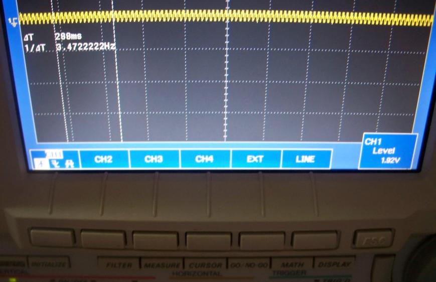 Triggerquellenmenü eines Yokogawa-Digital-Osziloskops DL1540CL